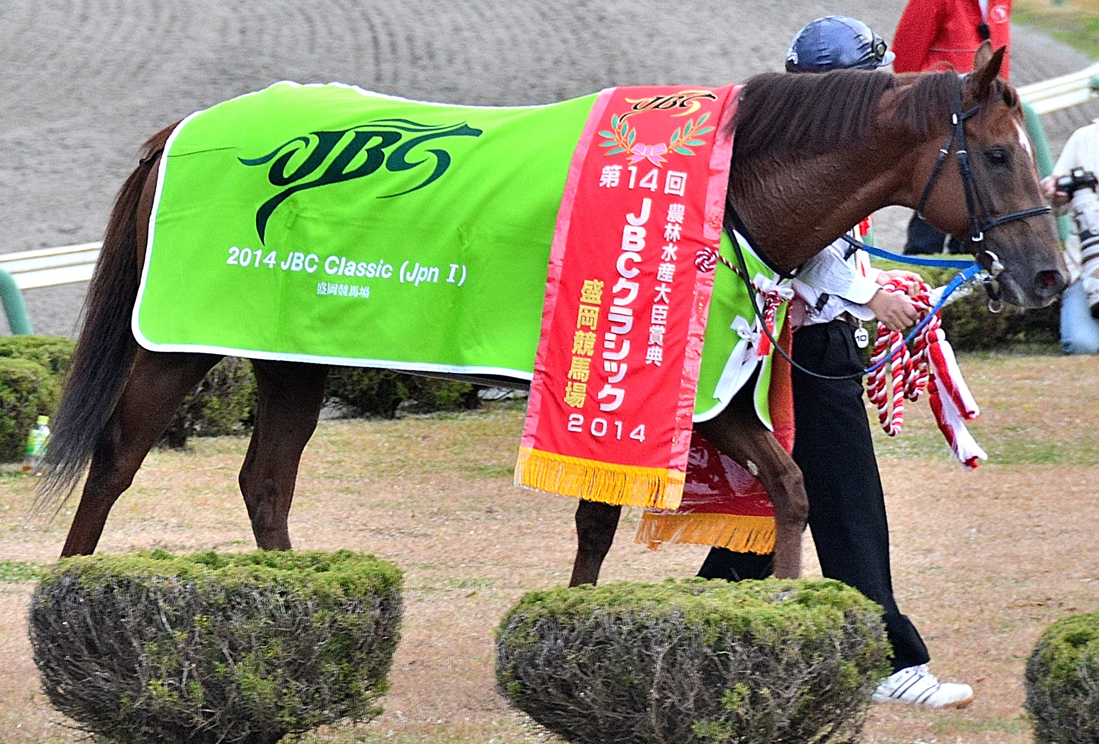 2014年11月3日に盛岡競馬場の第10競走で行われた「第14回JBCクラシック」の競走後に、優勝レイ（赤色）と馬着（緑色）を装着した勝利馬のコパノリッキーを観客席から撮影したもの。